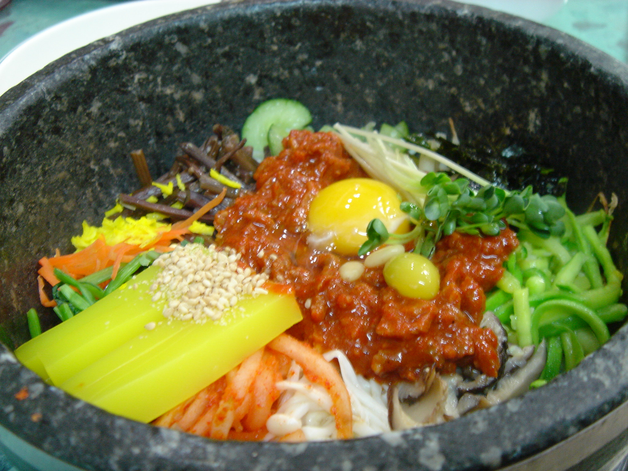 Jeonju bibimbap, a Korean dish